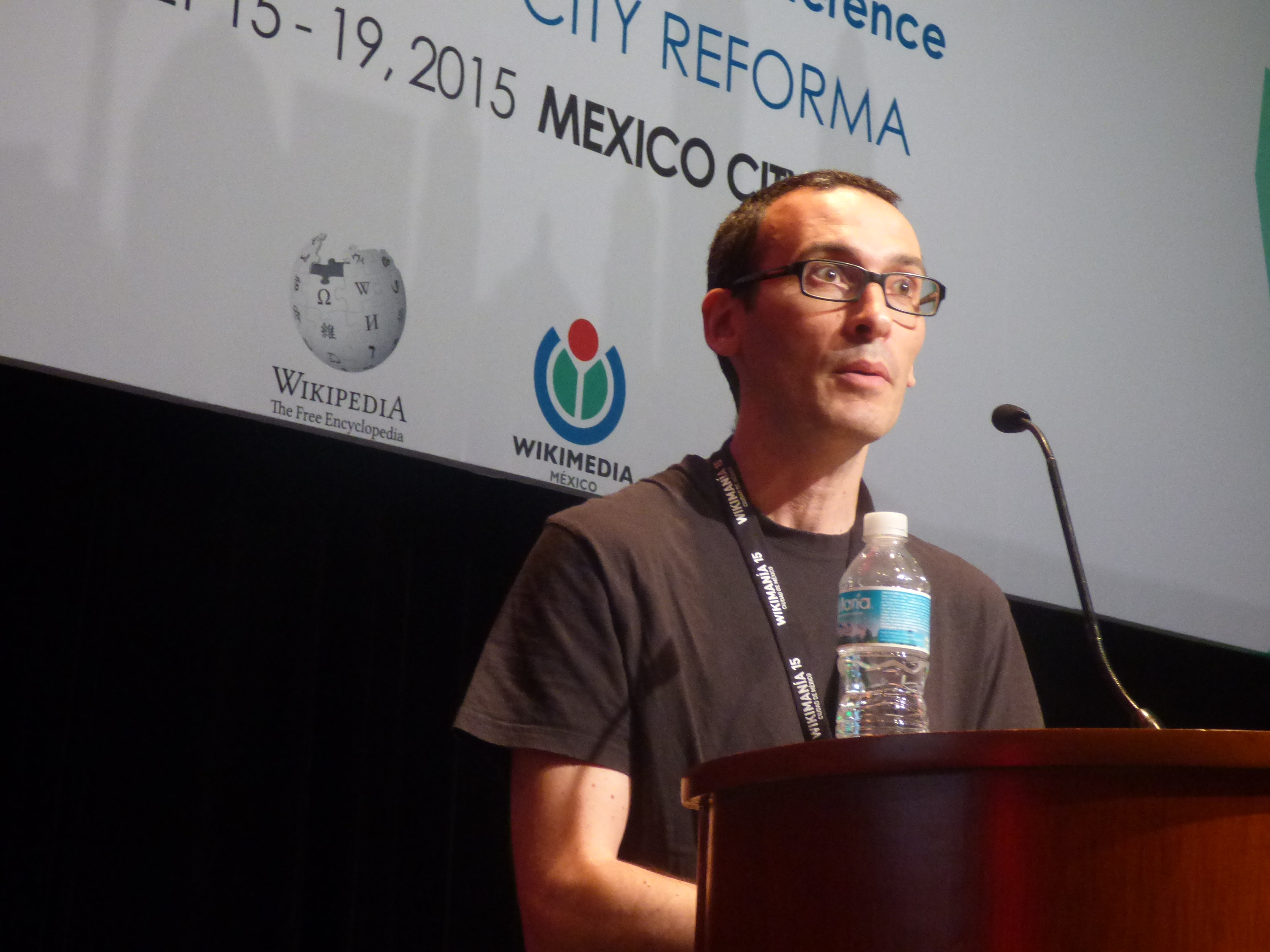 César Rendueles durante su conferencia en Wikimanía 2015